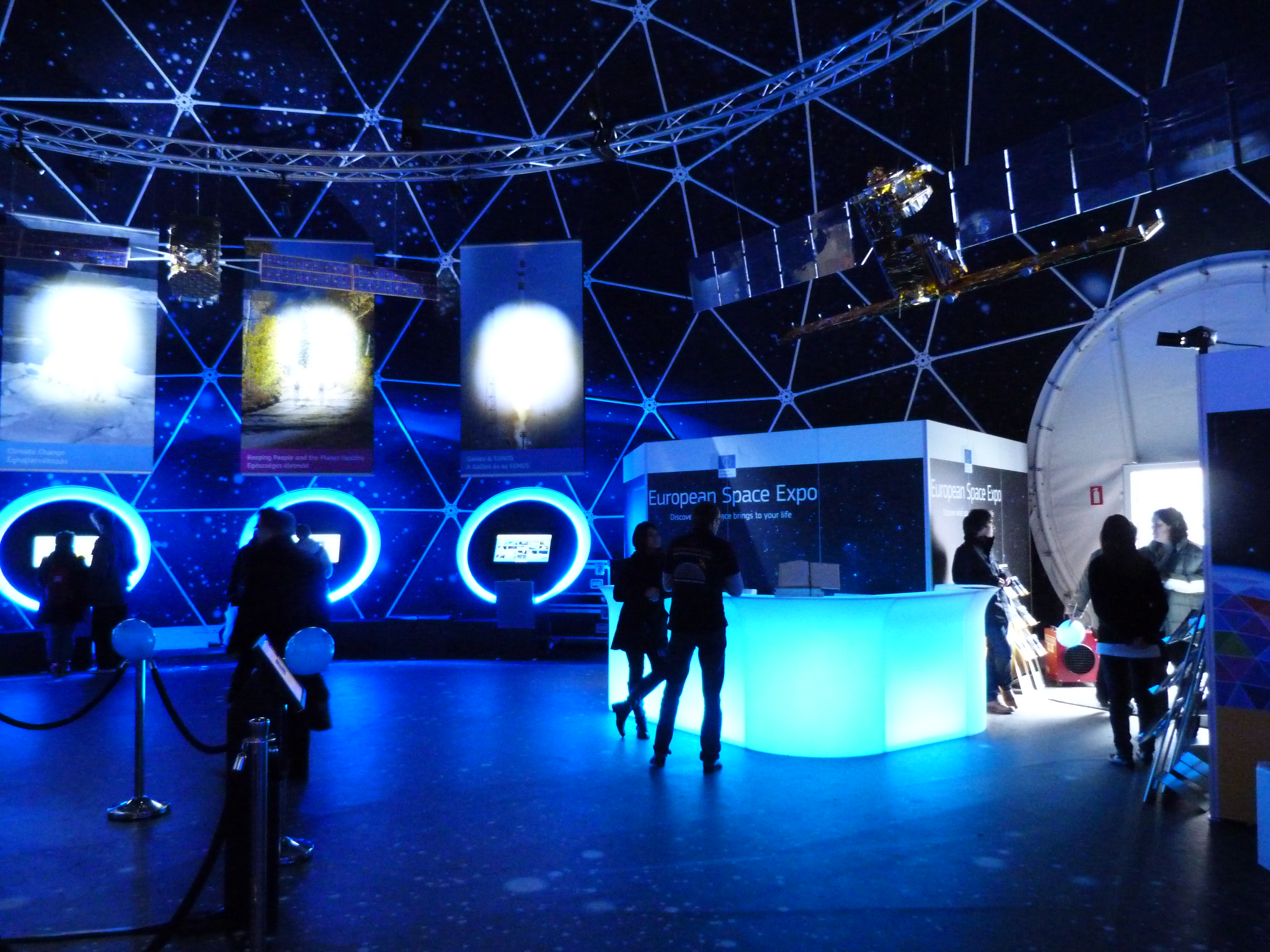 Live on the 22th of March, 2013. European Space Expo. Erzsébet tér, Downtown Budapest. Travelling exhibiton 20 - 25 March 2013. Europe is strengthening its capacity for sea monitoring, border surveillance, space exploration and providing all EU countries with access to space. Along with Galileo (global satellite navigation system) and Copernicus (global monitoring for environment and security system). Sources